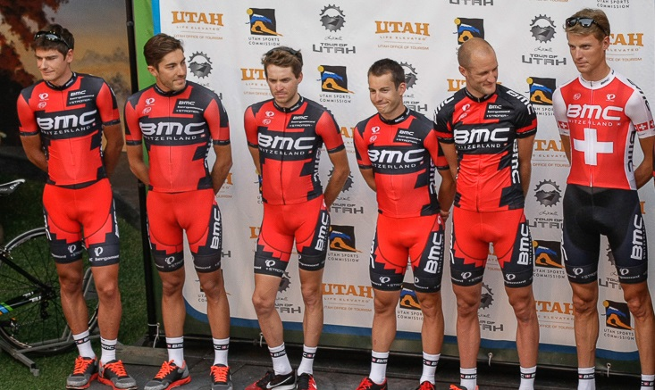 BMC Racing Team en la presentación del Tour de Utah 2013